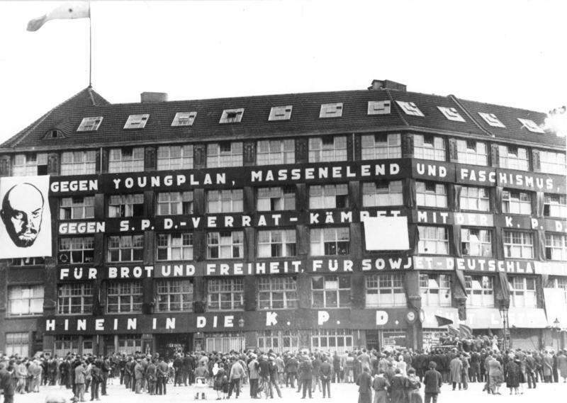 Berlin, Karl-Liebknecht-Haus am Tag der Reichstagswahl Deutschland 1930, Viele Berliner haben sich am 14.9.1930, dem Tag der Reichstagswahl, vor dem Karl-Liebknecht-Haus, Sitz des ZK der KPD, am Berliner Bülowplatz versammelt. [Berlin.- Parolen am Karl-Liebknecht-Haus: "Gegen Youngplan, Massenelend und Faschismus Gegen SPD-Verrat - kämpft mit der KPD Für Brot und Freiheit, für Sowjet-Deutschland Hinein in die KPD"]